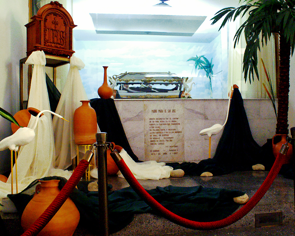 Primera beata de Venezuela con su cuerpo incorrupto en un sarcófago de cristal, su cuerpo reposa en Maracay - Edo. Aragua.